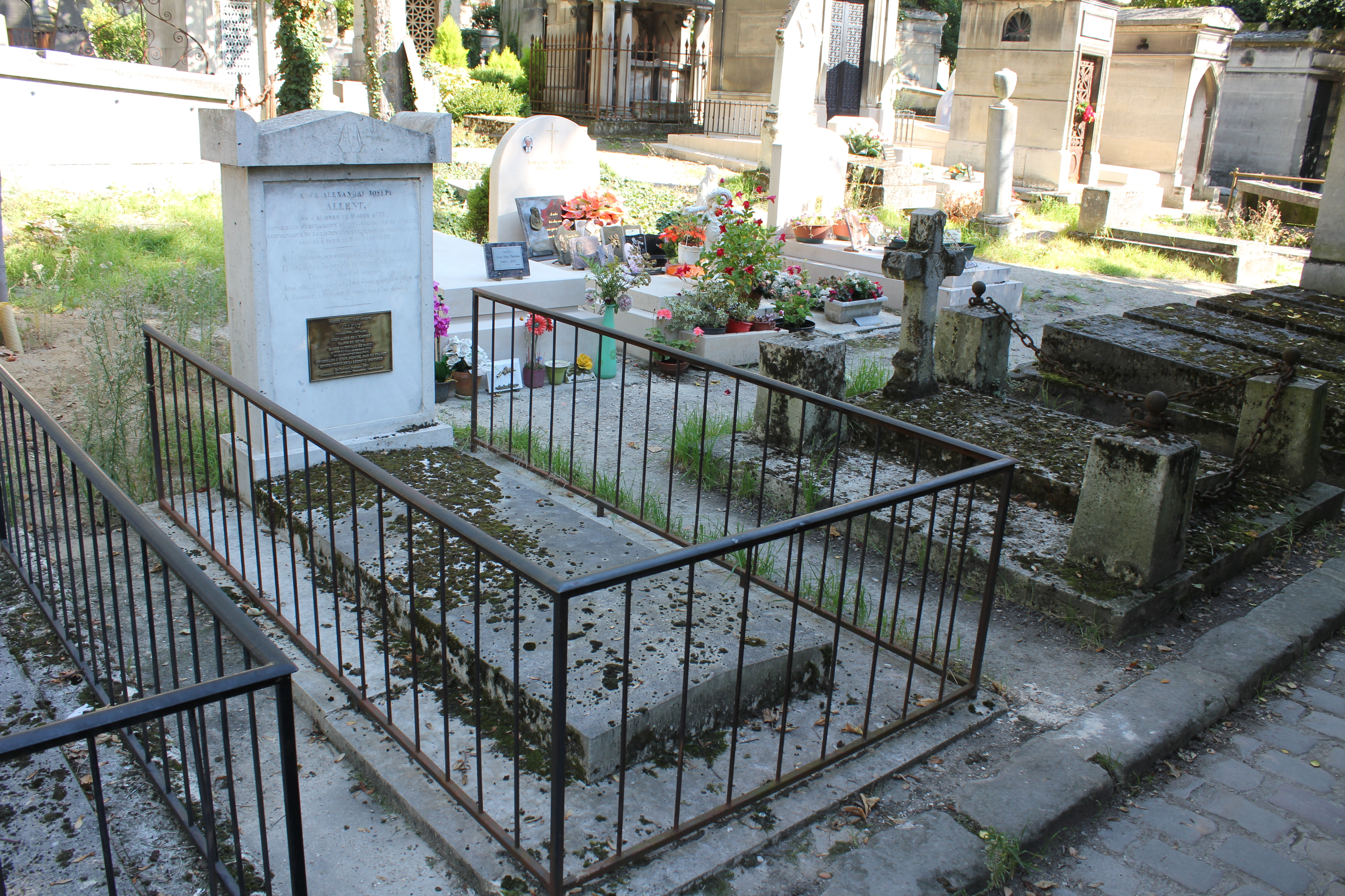 Sépulture de Pierre-Alexandre-Joseph Allent (1772-1837), général et homme politique français de la Révolution et du Premier Empire. face avant